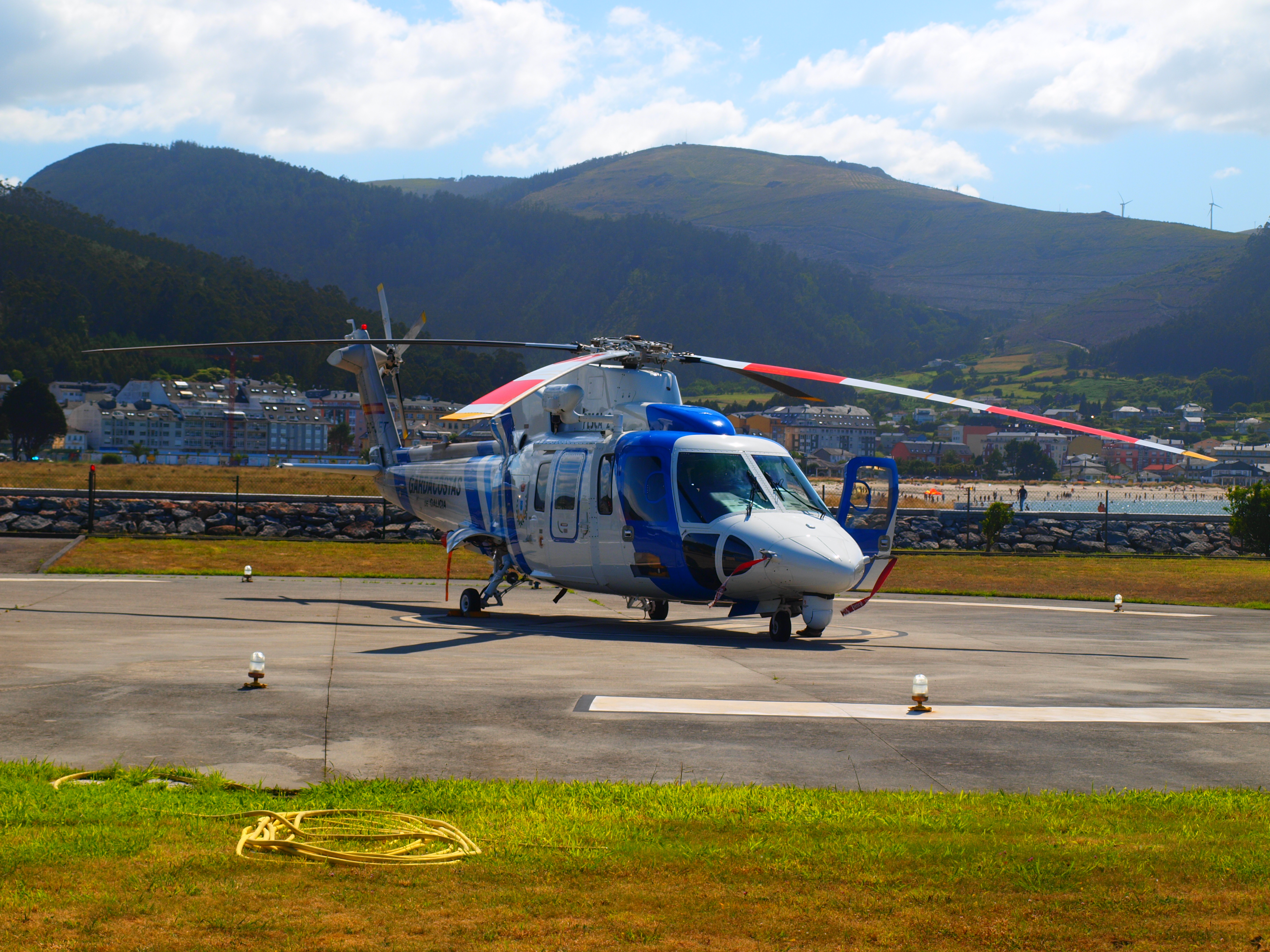 S-76 del Servicio de Gardacostas de Galicia